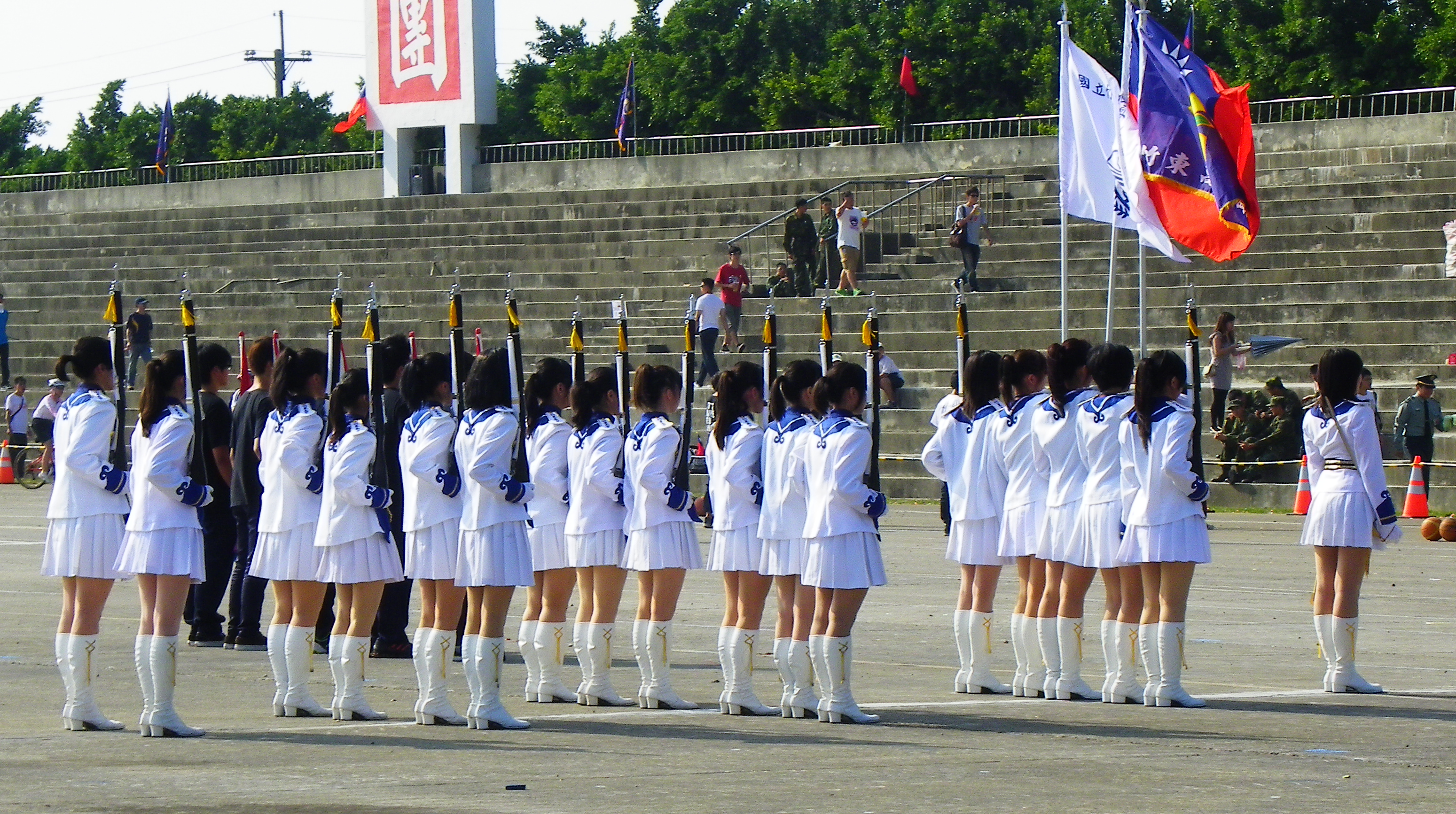 2012年湖口營區開放活動，從下午操演開始30分前，肅立中興臺閱兵場的竹東高中樂旗隊。